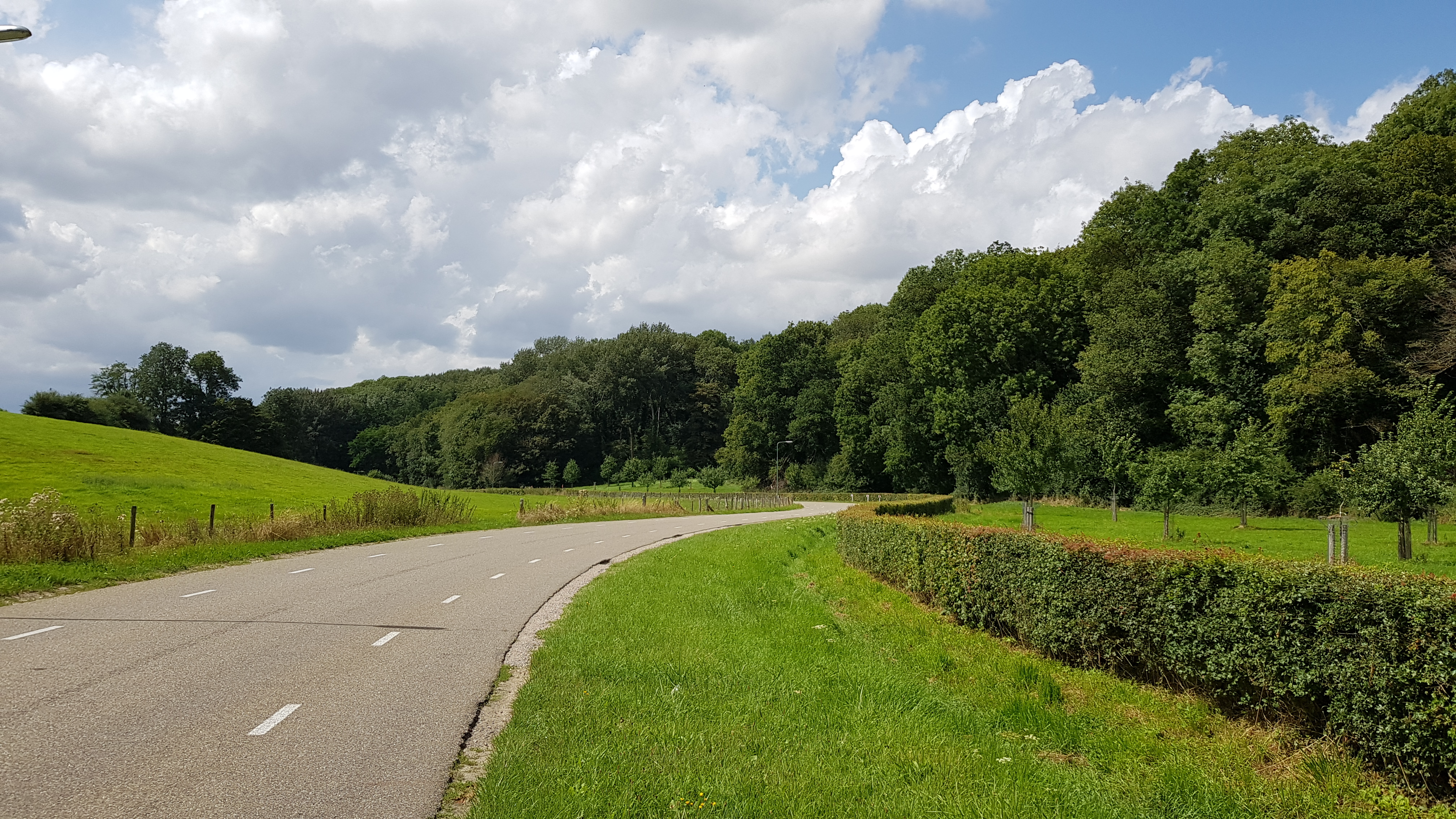 Herkenradergrub, Moerslag / Sint Geertruid, Nederland